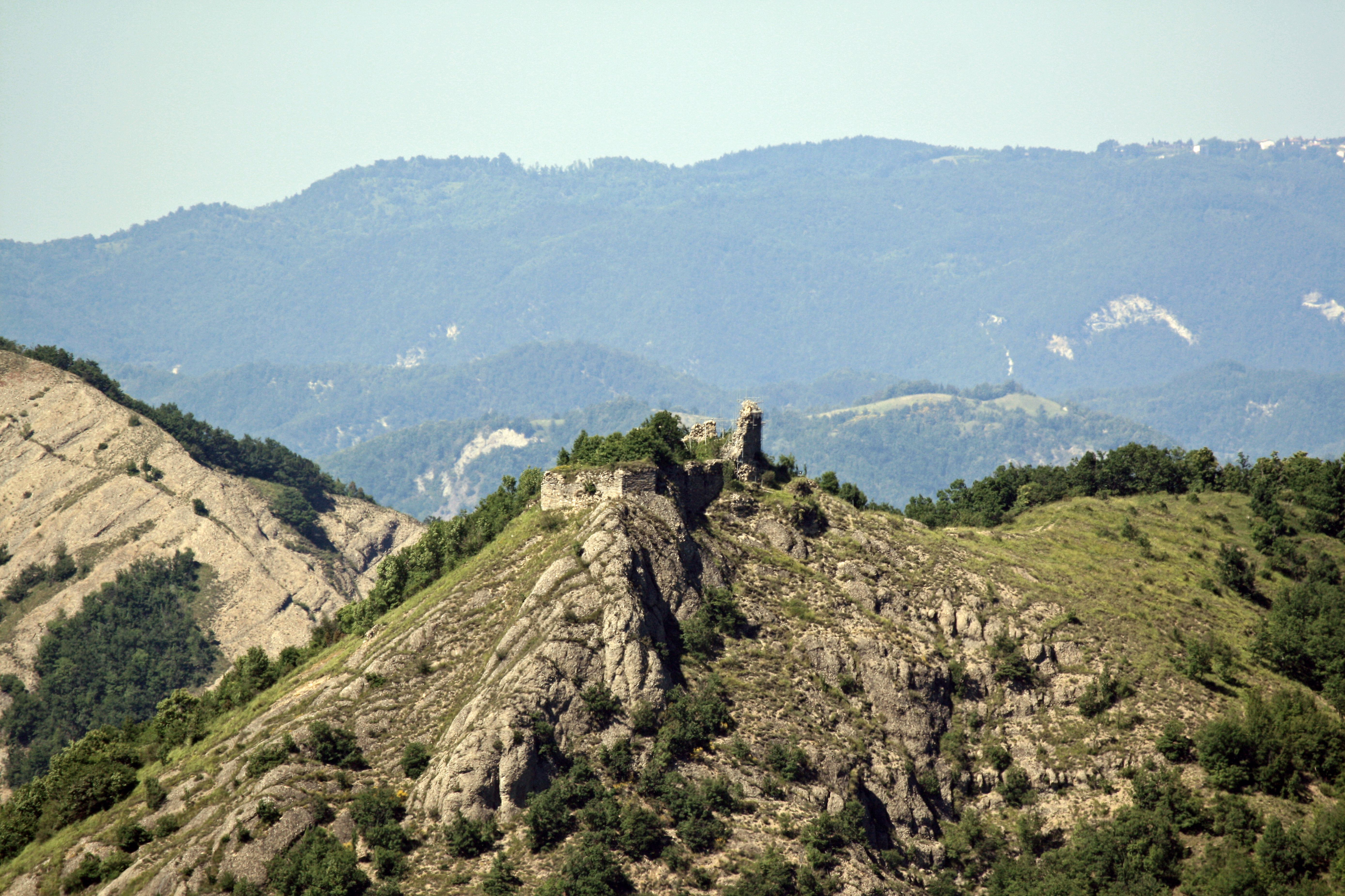 Le rovine del castello di Roccaforte Ligure (704 mt d'altezza) tra val Sisola e valle Spinti.